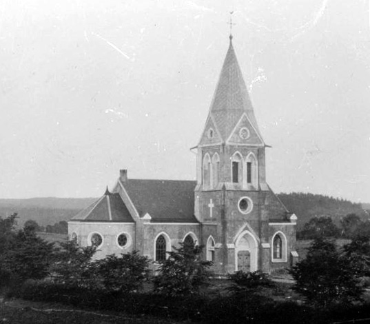 Kyrkan från nordöst. Kategori: (01) ExteriörerKyrkan från nordöst.